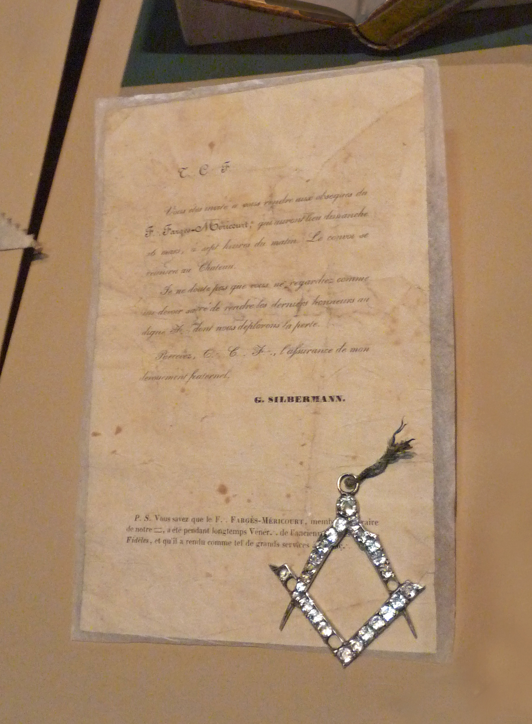 Franc-maçonnerie à Strasbourg : bijou de maître et faire-part de décès de Philippe Jacques Fargès-Méricourt (1843)